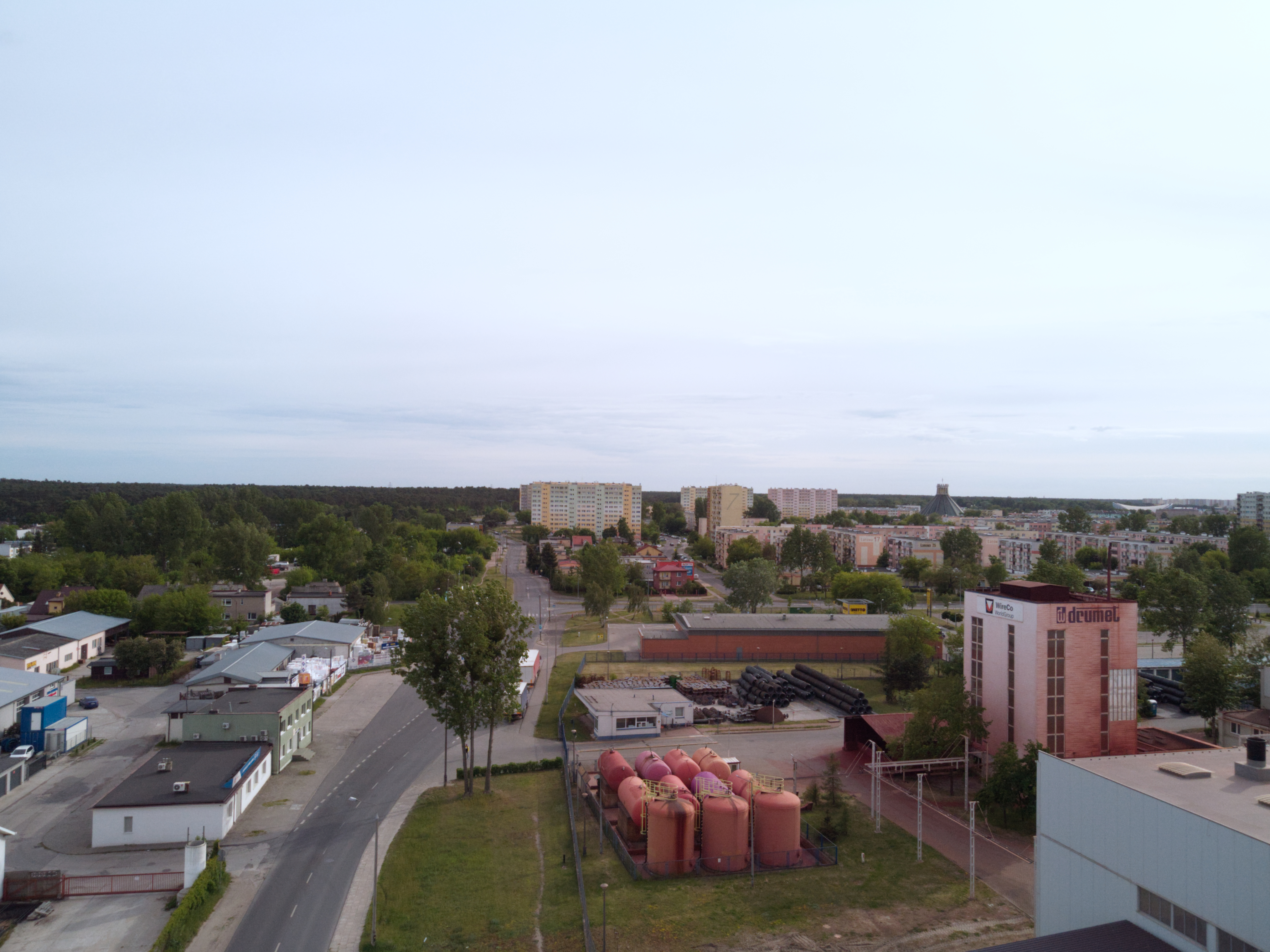 Kazimierza Wielkiego (2020)